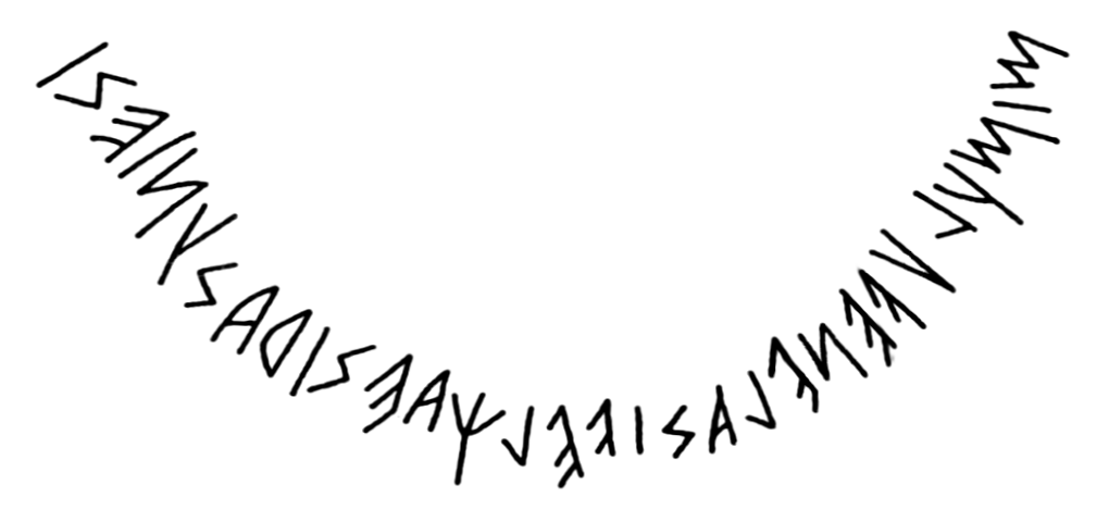 Iscrizione etrusche su un calice dalla Tomba 3509 di Pontecagnano: MI MULU VENELASI VELCHAESI RASUNIESI